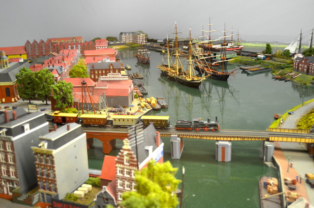 Nederlands Spoorwegmuseum Maquette omgeving Amsterdam Centraal Station - Westerdok; 1889. Foto: Erik Swierstra.